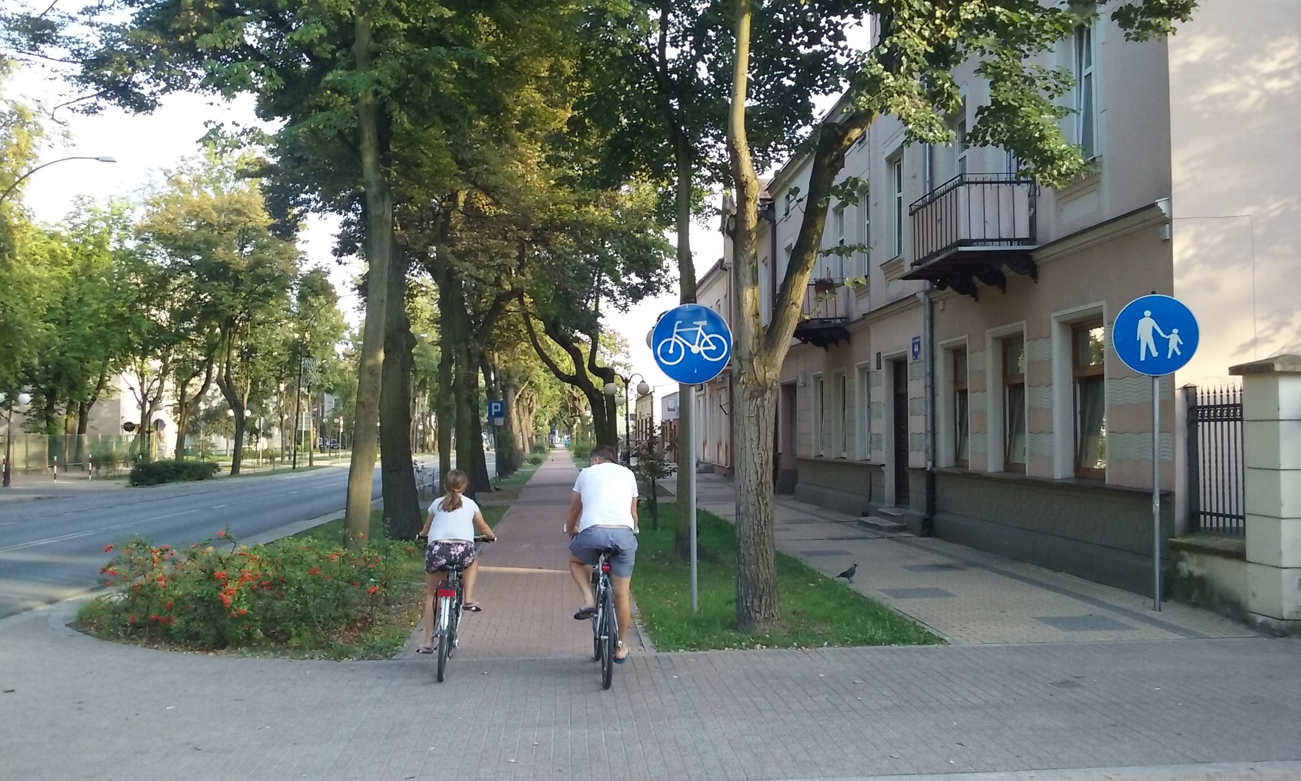 Jedna ze ścieżek rowerowych w sześćdziesięciotysiecznym Tomaszowie Mazowieckim. Ulica Świętego Antoniego